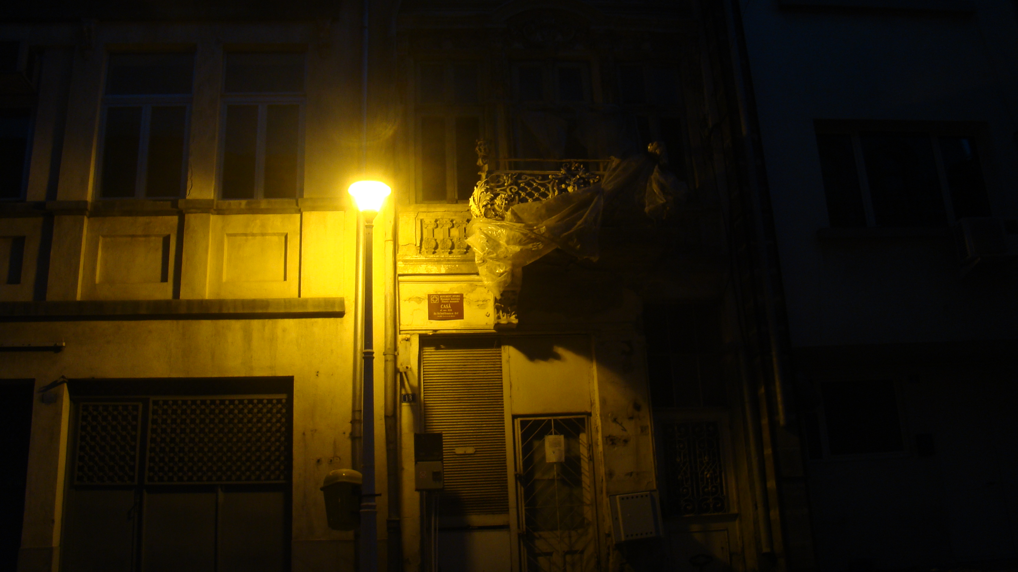 Casă Str Romain Rolland 18F